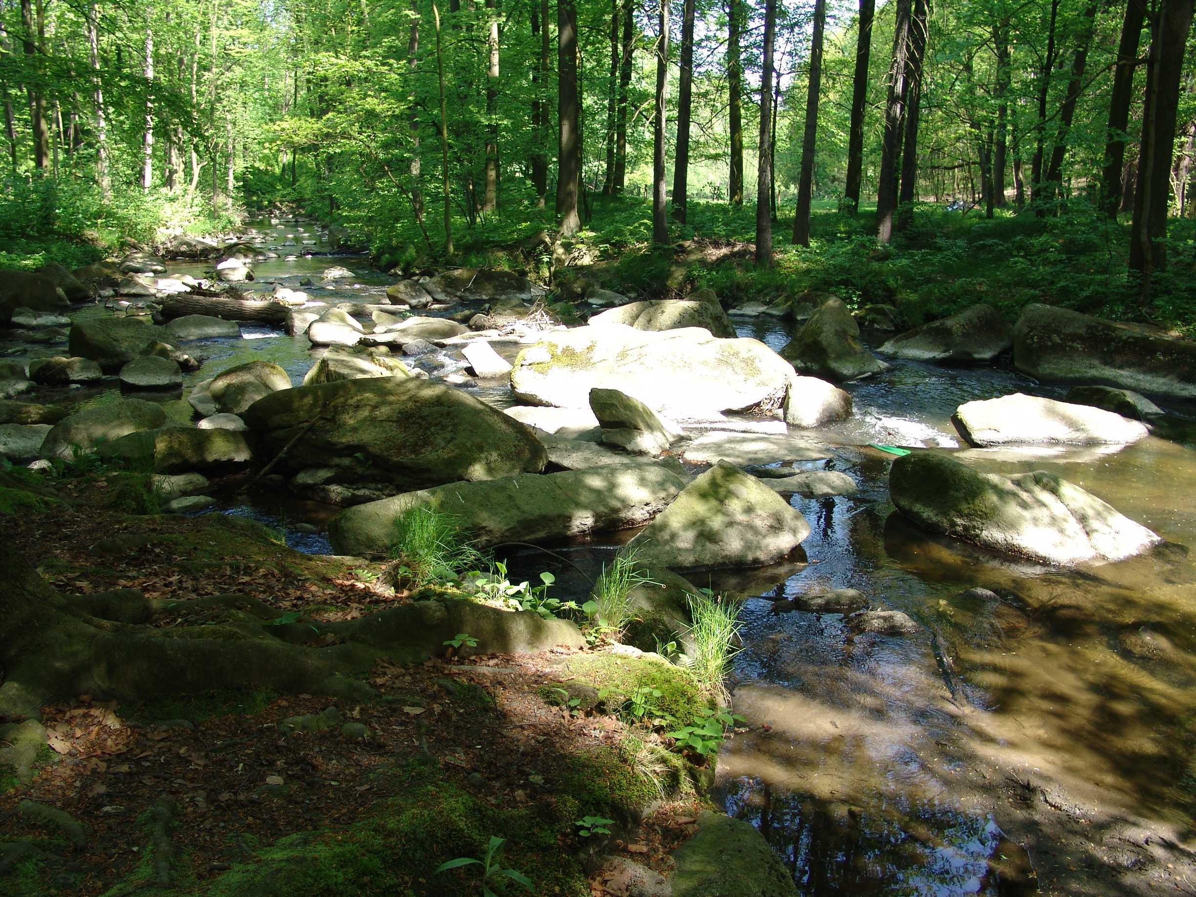 Spree (NICHT Spreepark!) in Neusalza-Spremberg